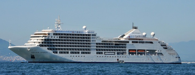 Silver Spirit vor Anker vor Sorrent